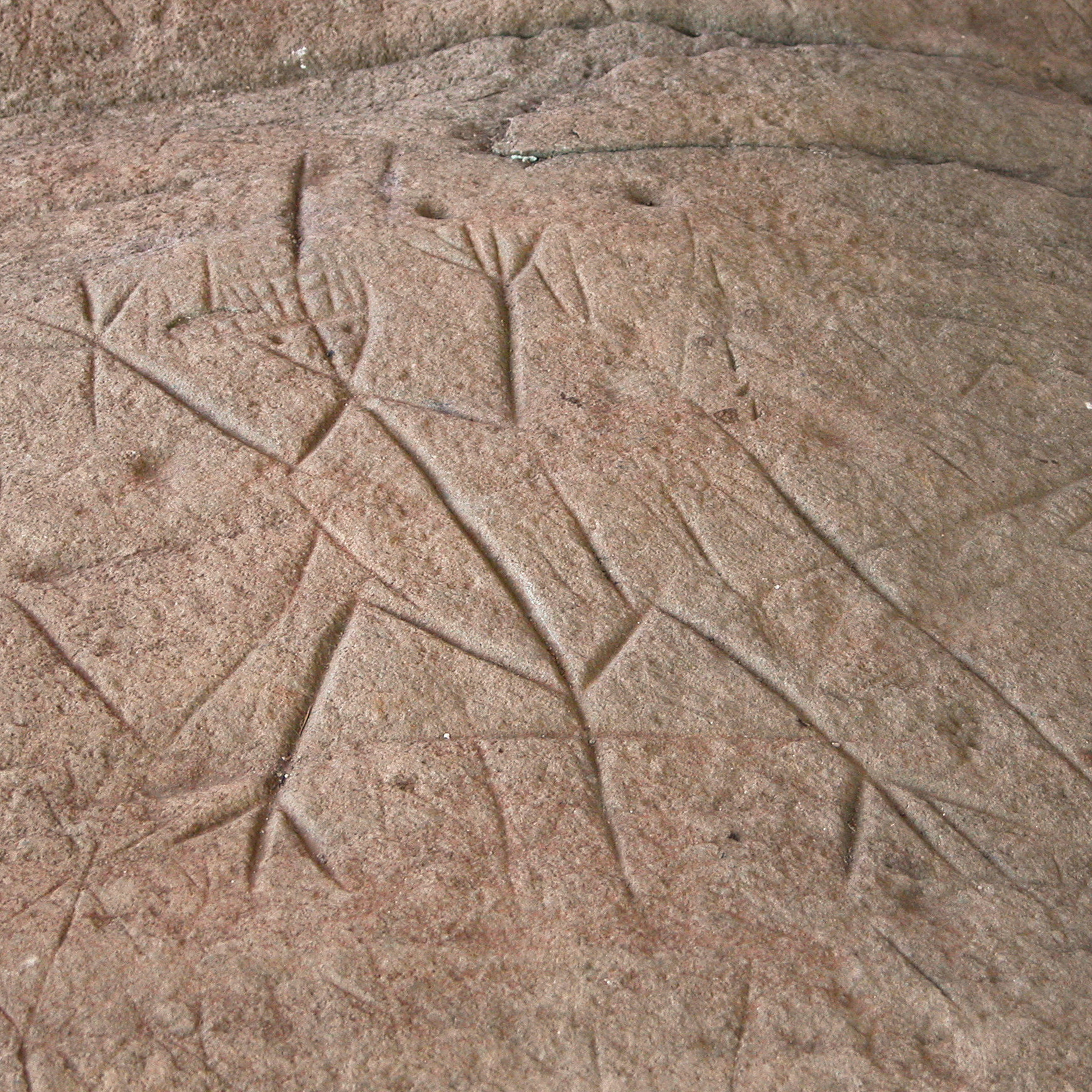 Roches gravées de la Carapa (Classées, 1993)